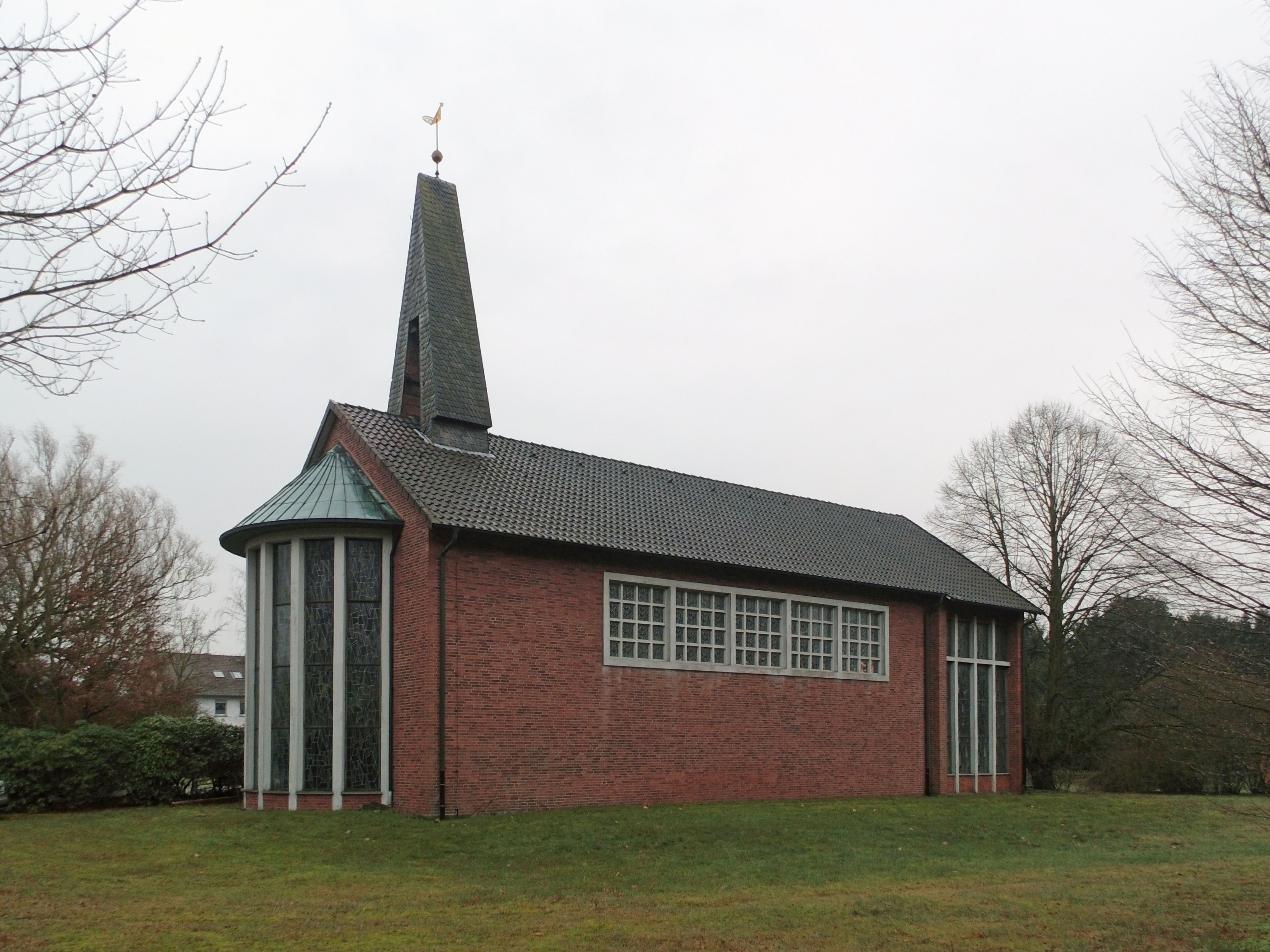 Katholische Heilige-Familie-Kirche in Rodewald von Nordosten gesehen.